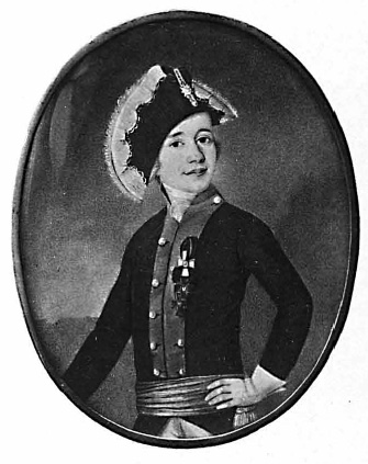 Count Sergei Kamensky (1771-1834)